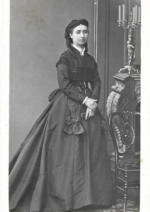 A 24 ans Victoire Labordère